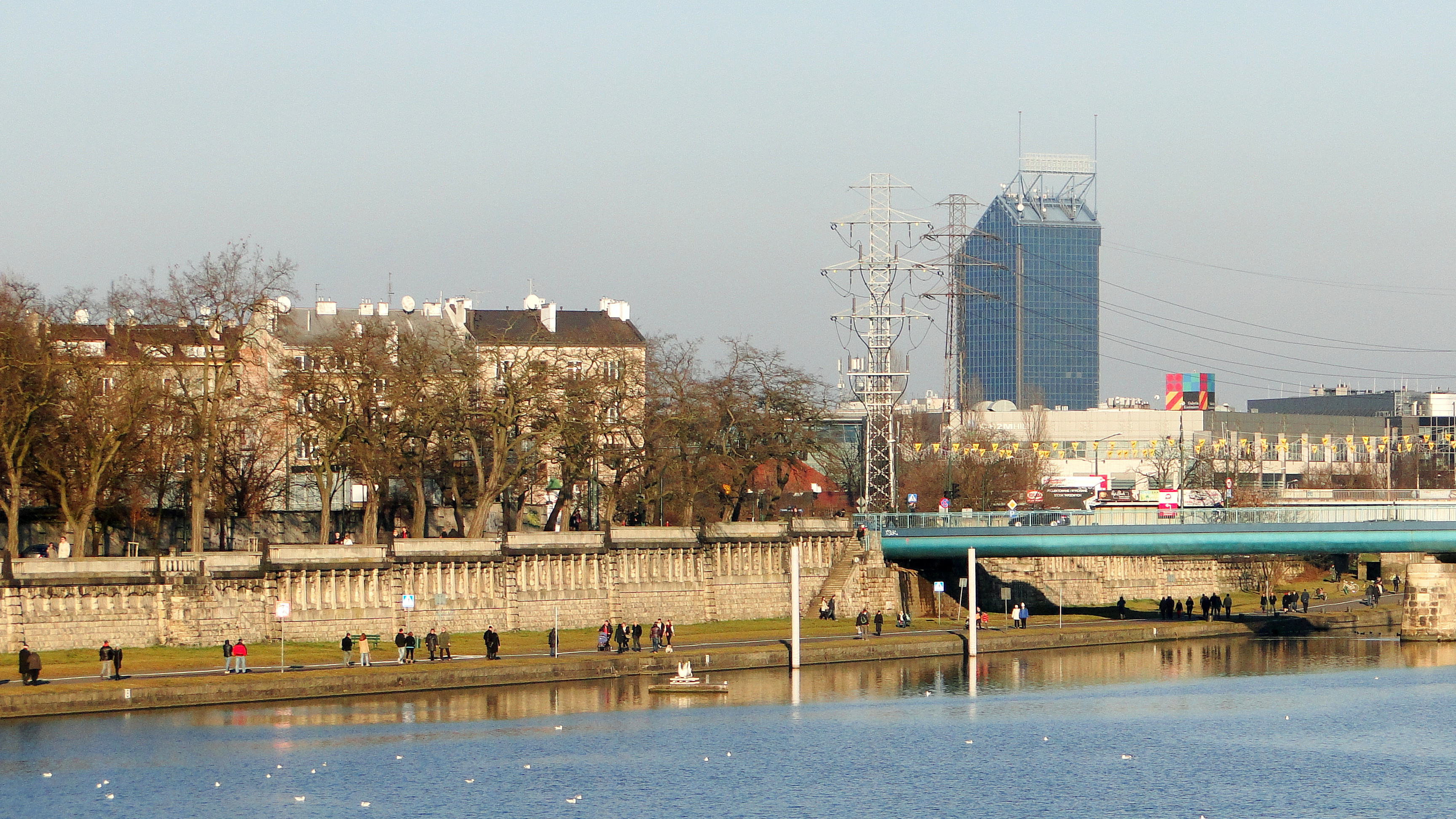 Bulwar Kurlandzki, po lewej widoczny most Powstańców Śląskich oraz Galeria Kazimierz, a w tle Cracovia Business Center (Błękitek)